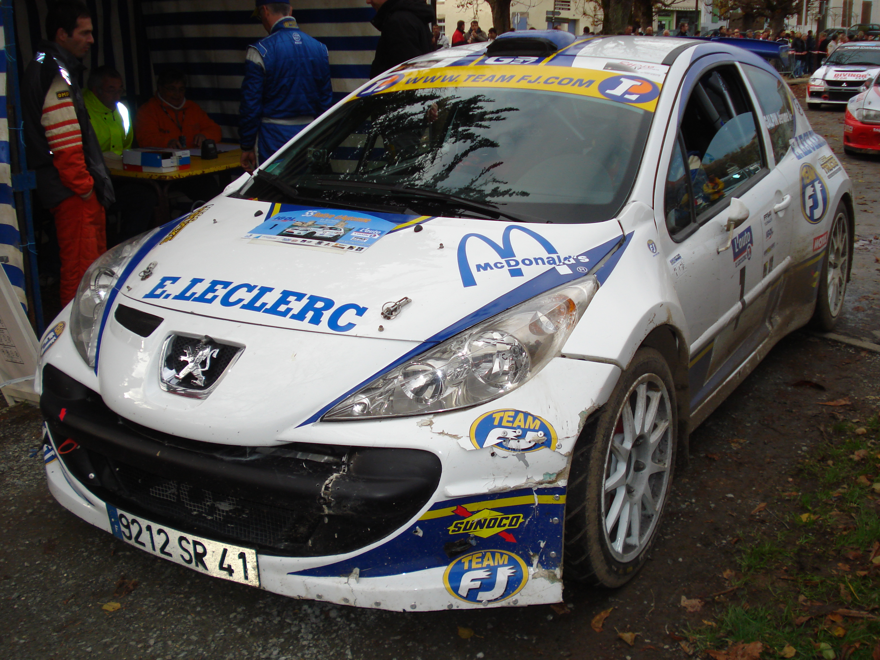 La 207 S2000 de Jérôme Galpin lors de la victoire au Rallye d'Automne 2010